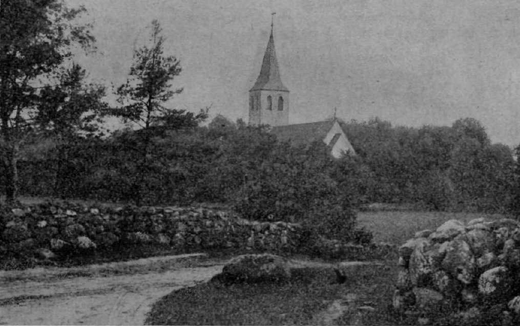 Foto teosest "Tõll ja ta sugu" (lk 141)